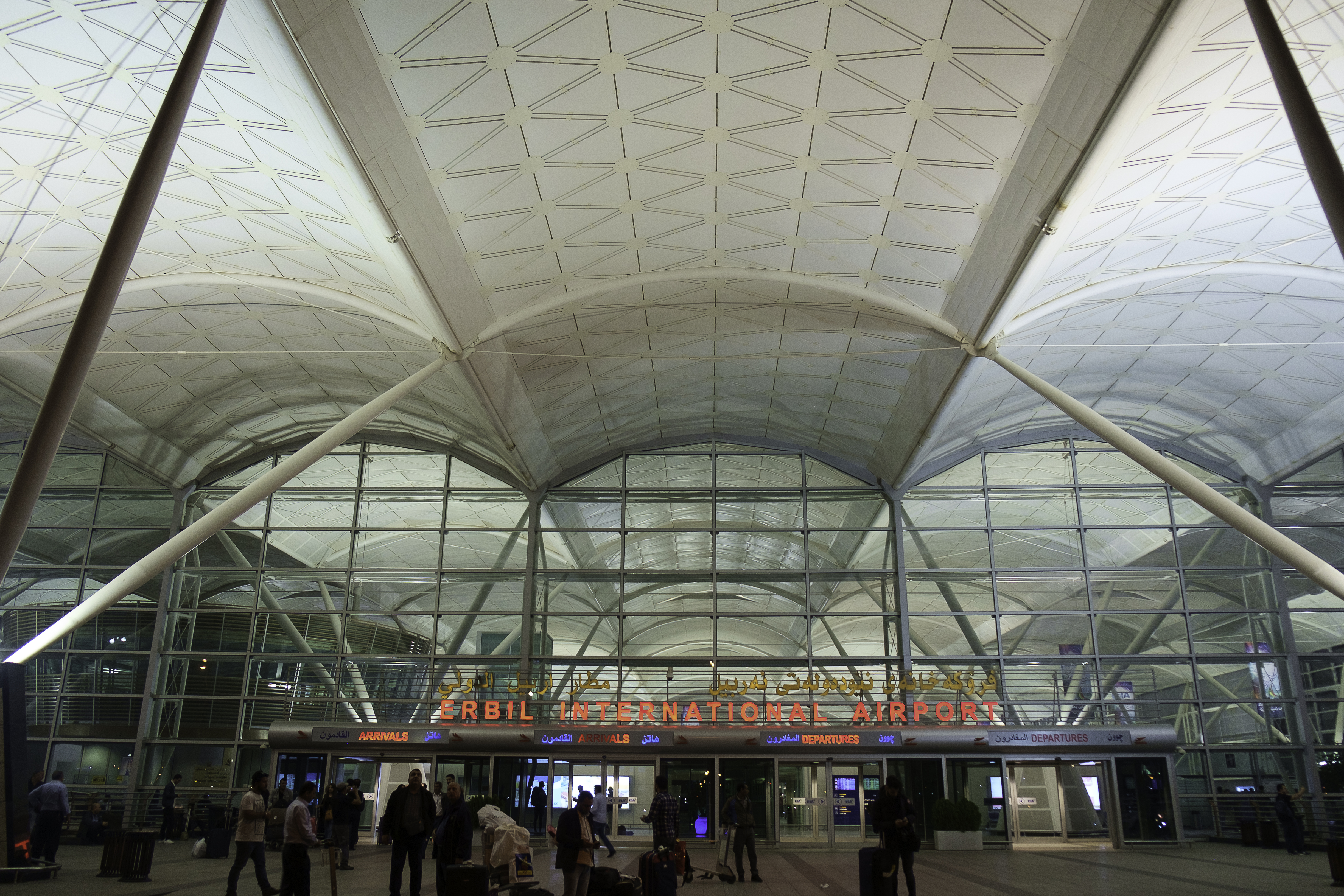 Entrance to Erbil International Airport